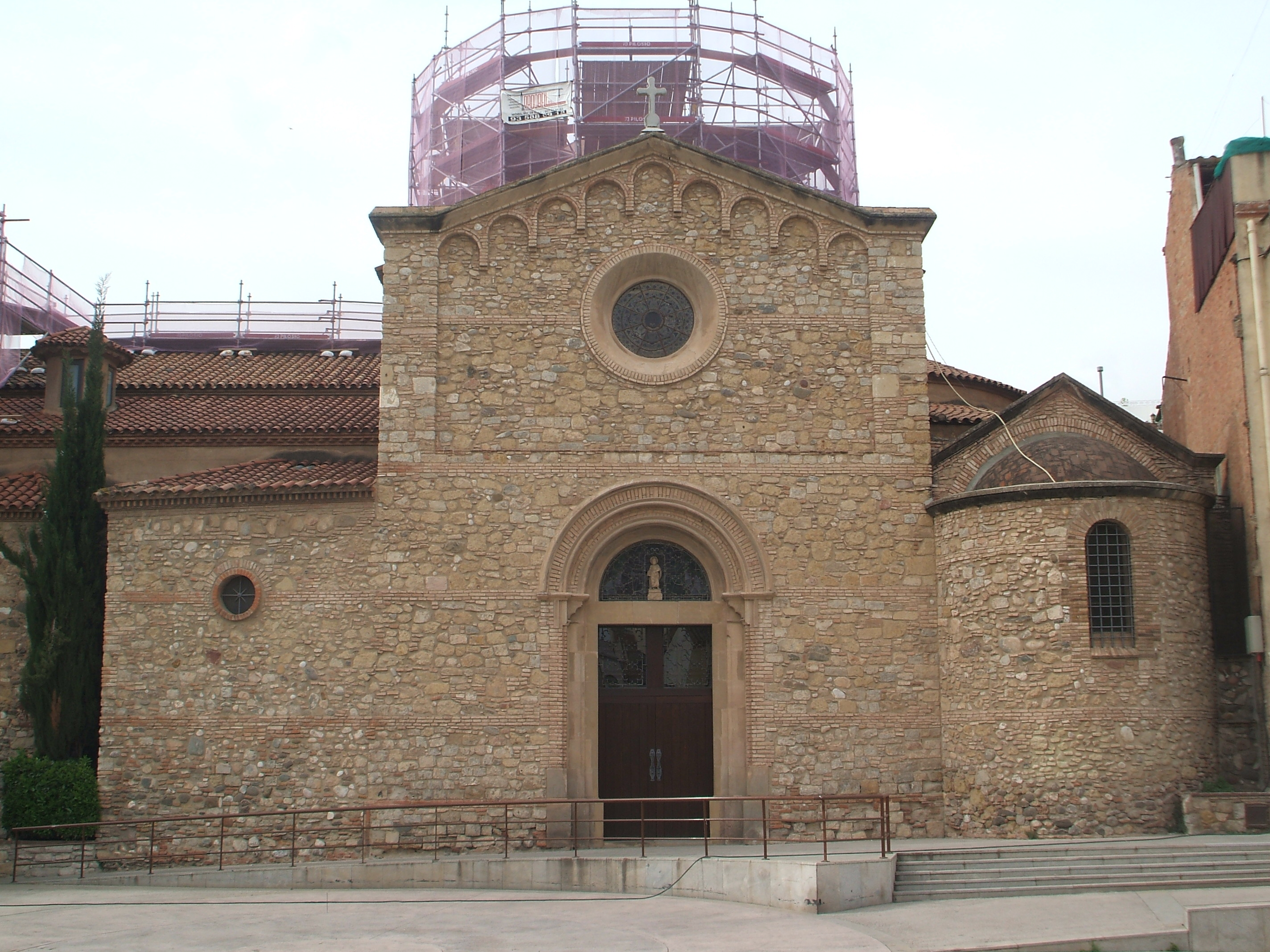 Esglesia de Sant Pere de Rubí